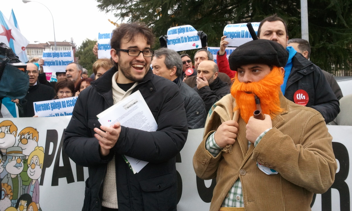 Carlos Callón, co 'Apalpador', ante San Caetano nunha concentración de Queremos Galego no 2012.